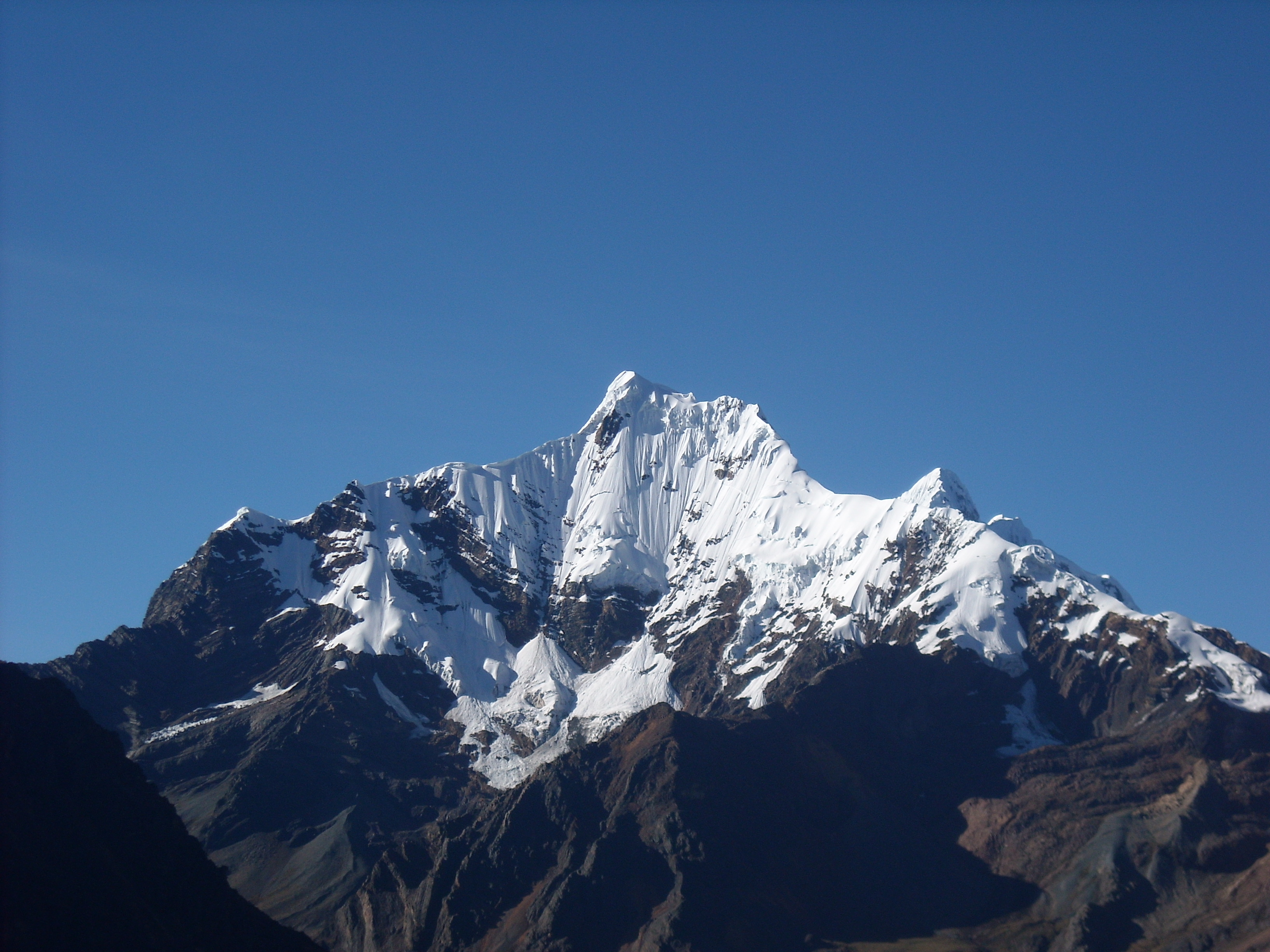 Cordillera Blanca, Áncash - Perú.